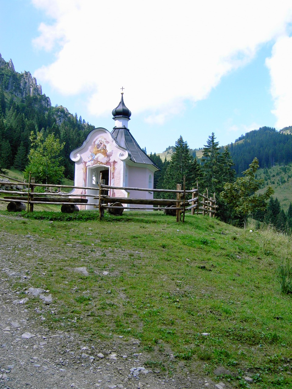 Josefskapelle am Wanderweg zum Pürschling